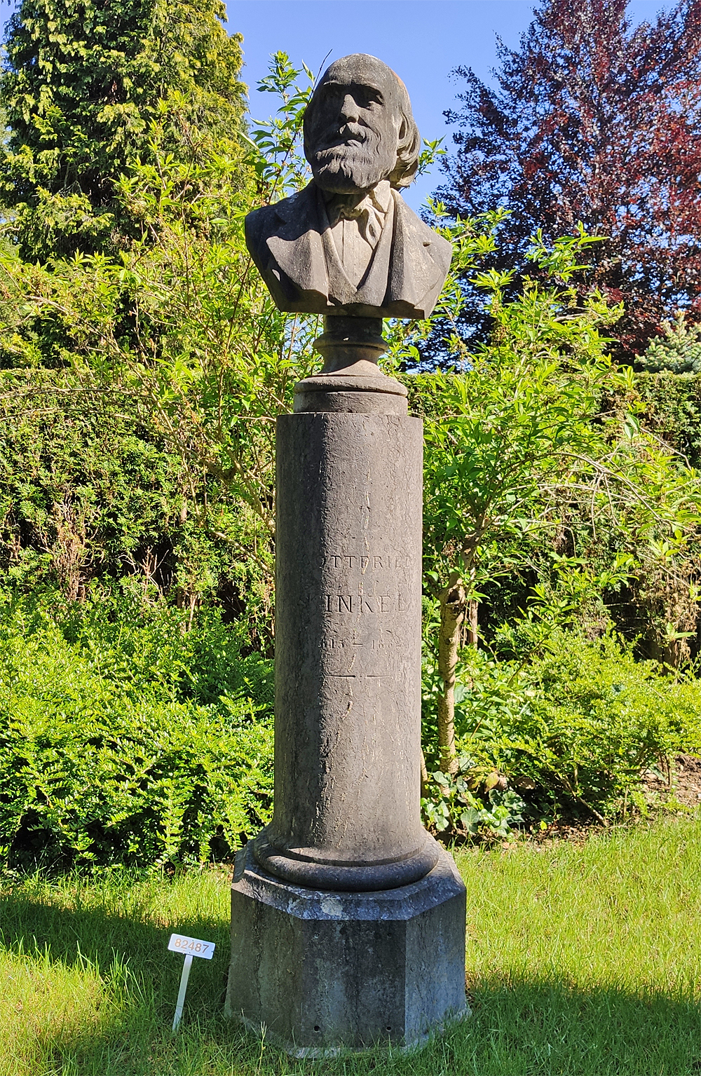 Grabstätte des Schriftstellers Johann Gottfried Kinkel (1815-1882) auf dem Friedhof Sihlfeld in Zürich